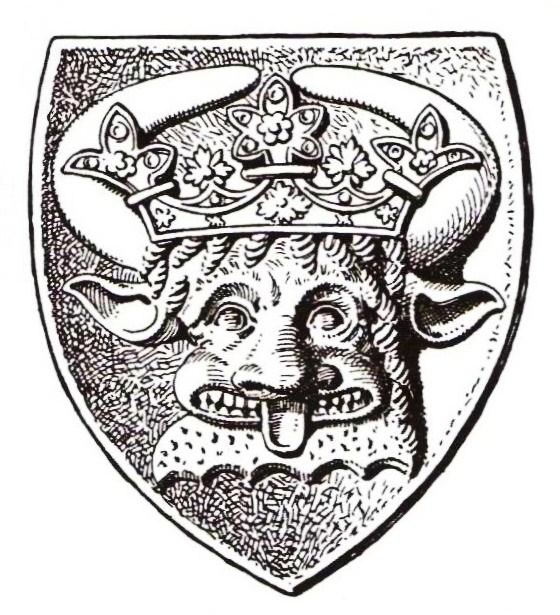 Wappen der Herzöge von Mecklenburg (Mecklenburger Stierkopf)